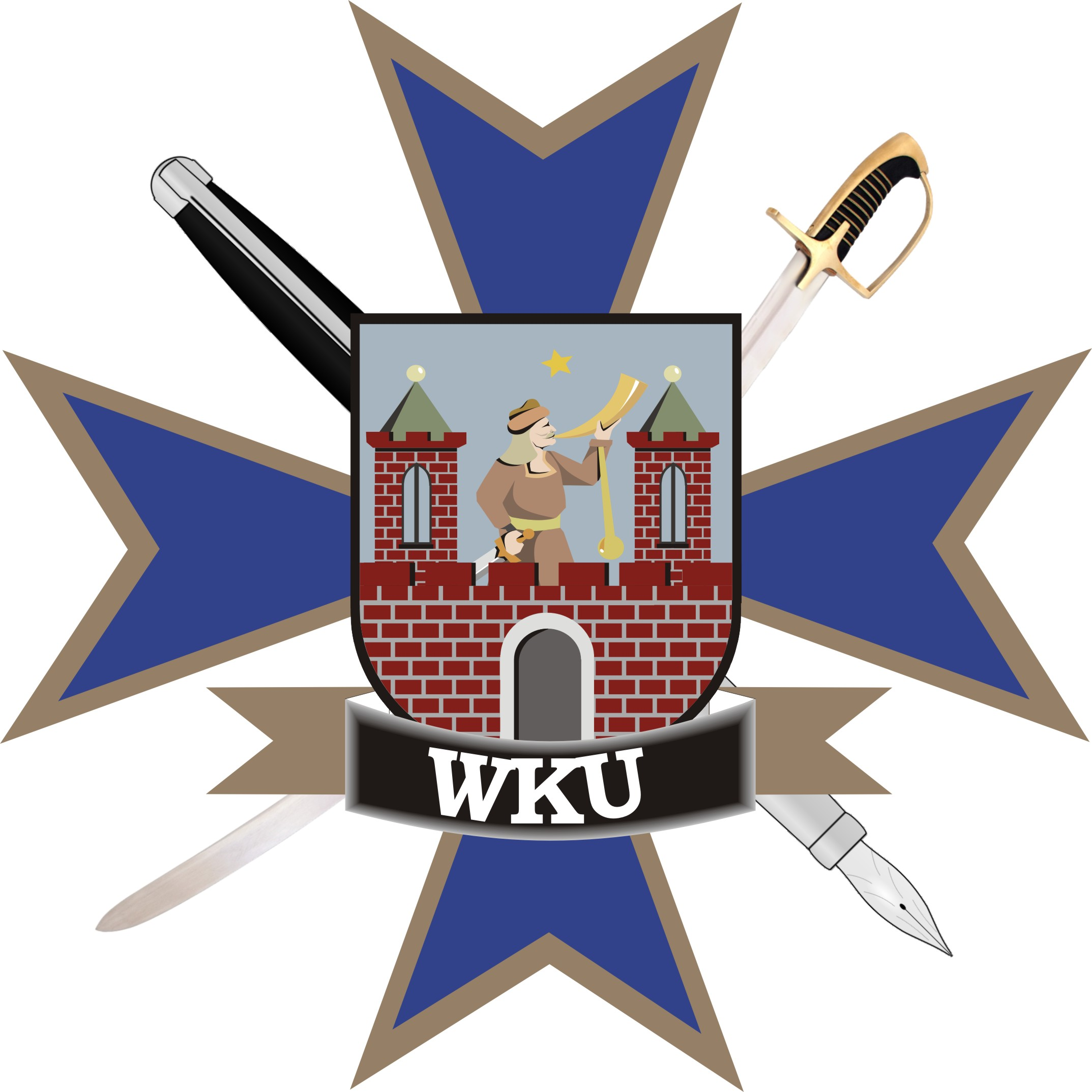 Odznaka Wojskowej Komendy w Kaliszu